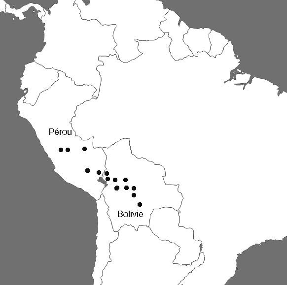 Carte de répartition de Cinchona calisaya, d'après Lennart Andersson, A Revision of the Genus Cinchonine (Rubiaceae - Cinchoneae), Memoirs of the New York Botanical Garden, 80, 1998.